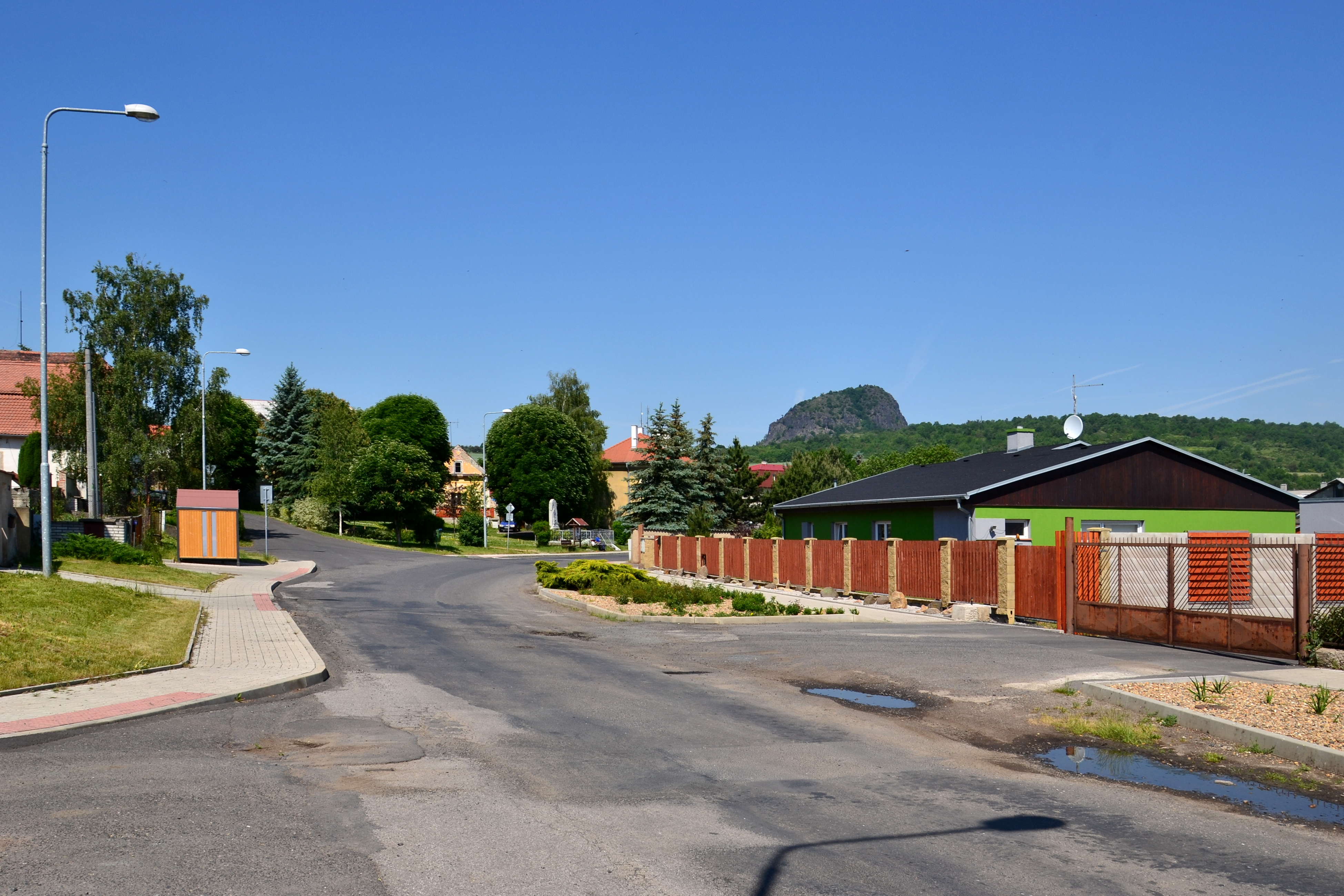 Hrobčická náves